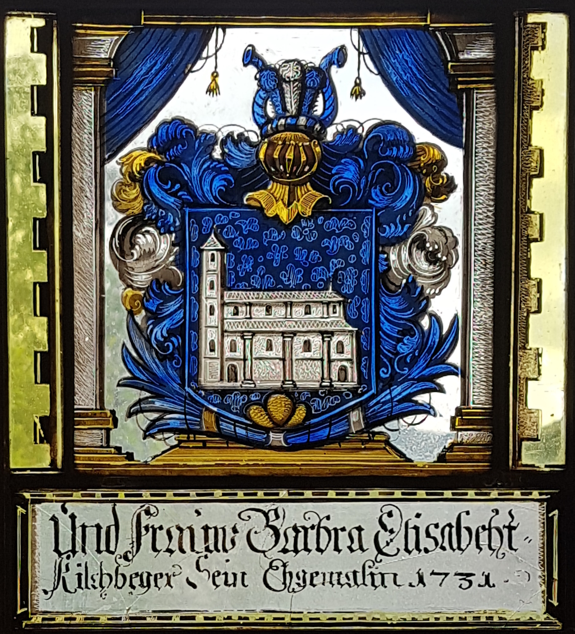 Wappenscheibe Barbara Kirchberger